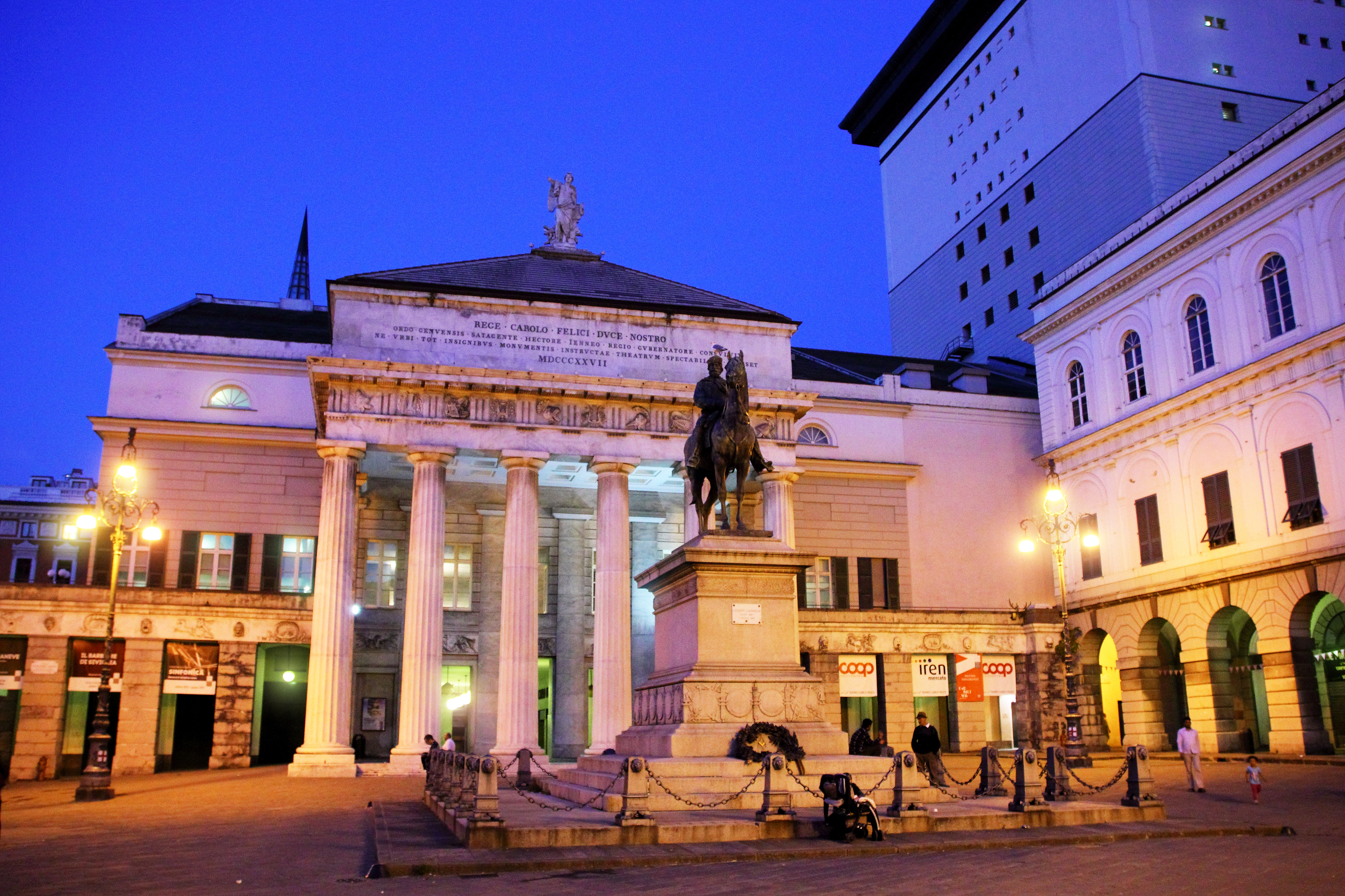 Teatro Carlo Felice This is a photo of a monument which is part of cultural heritage of Italy.